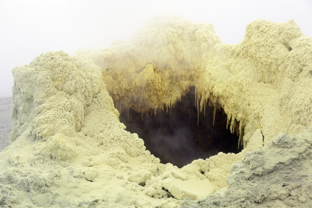 Вулкан Менделеева: Центр - 43°58'38" N 145°44'22" E., Южно-Курильский городской округ, Сахалинская область This image is related to the protected area of Russia number 6510088